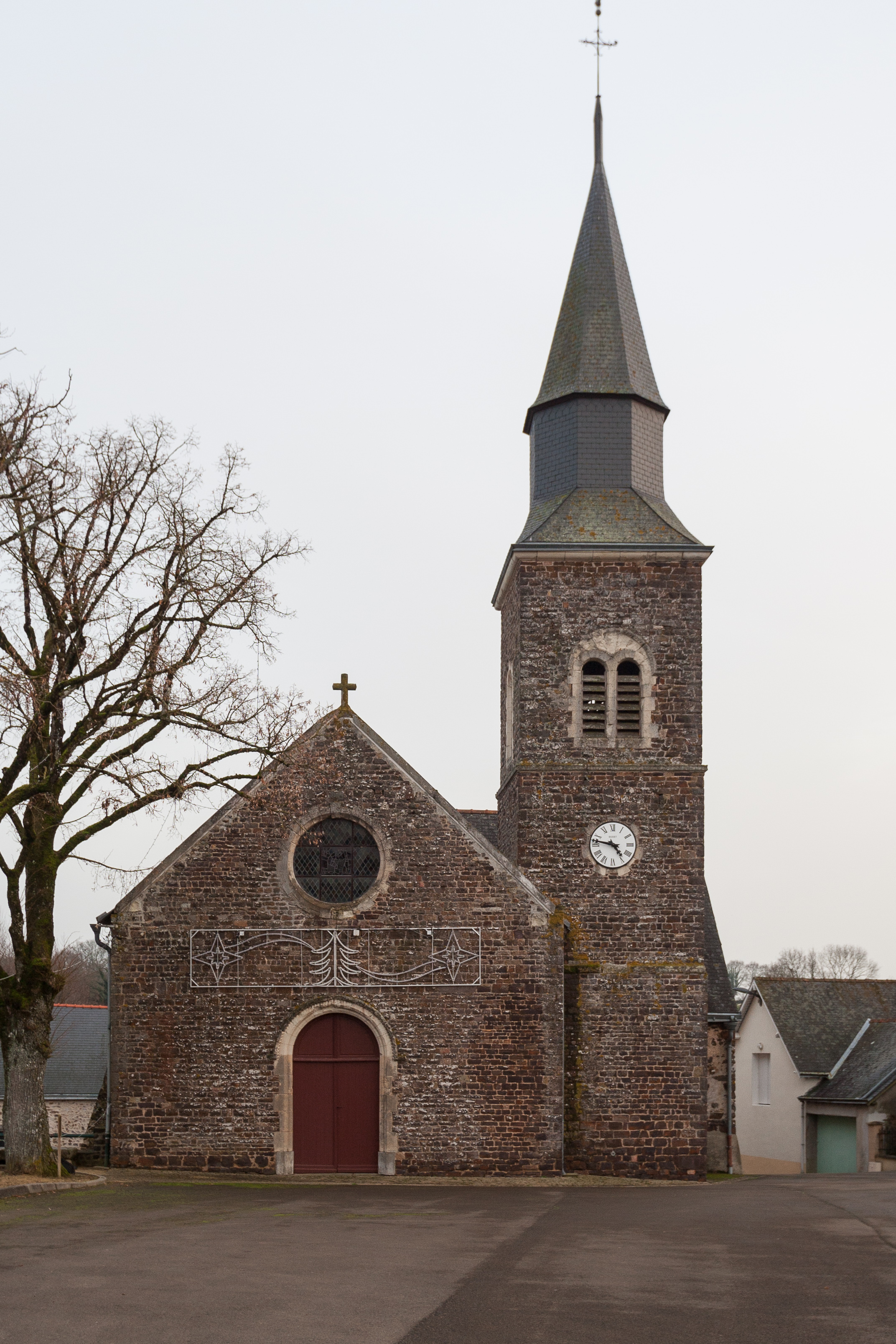 Église Saint-Pierre de Chammes en Mayenne.